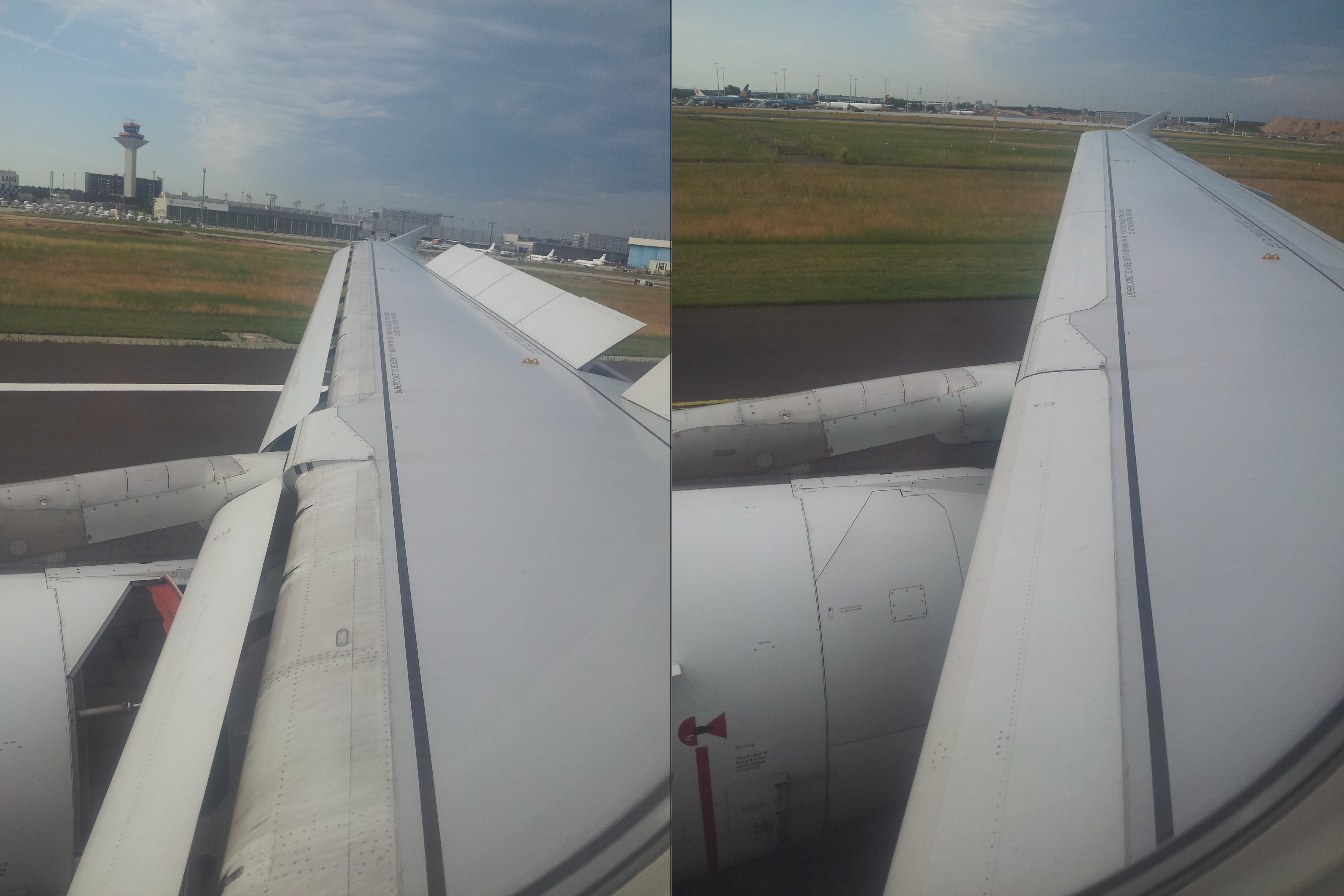 Voilure d'un A319 avec ailerons, becs et spoilers - atterrissage-freinage et position standard Unknown